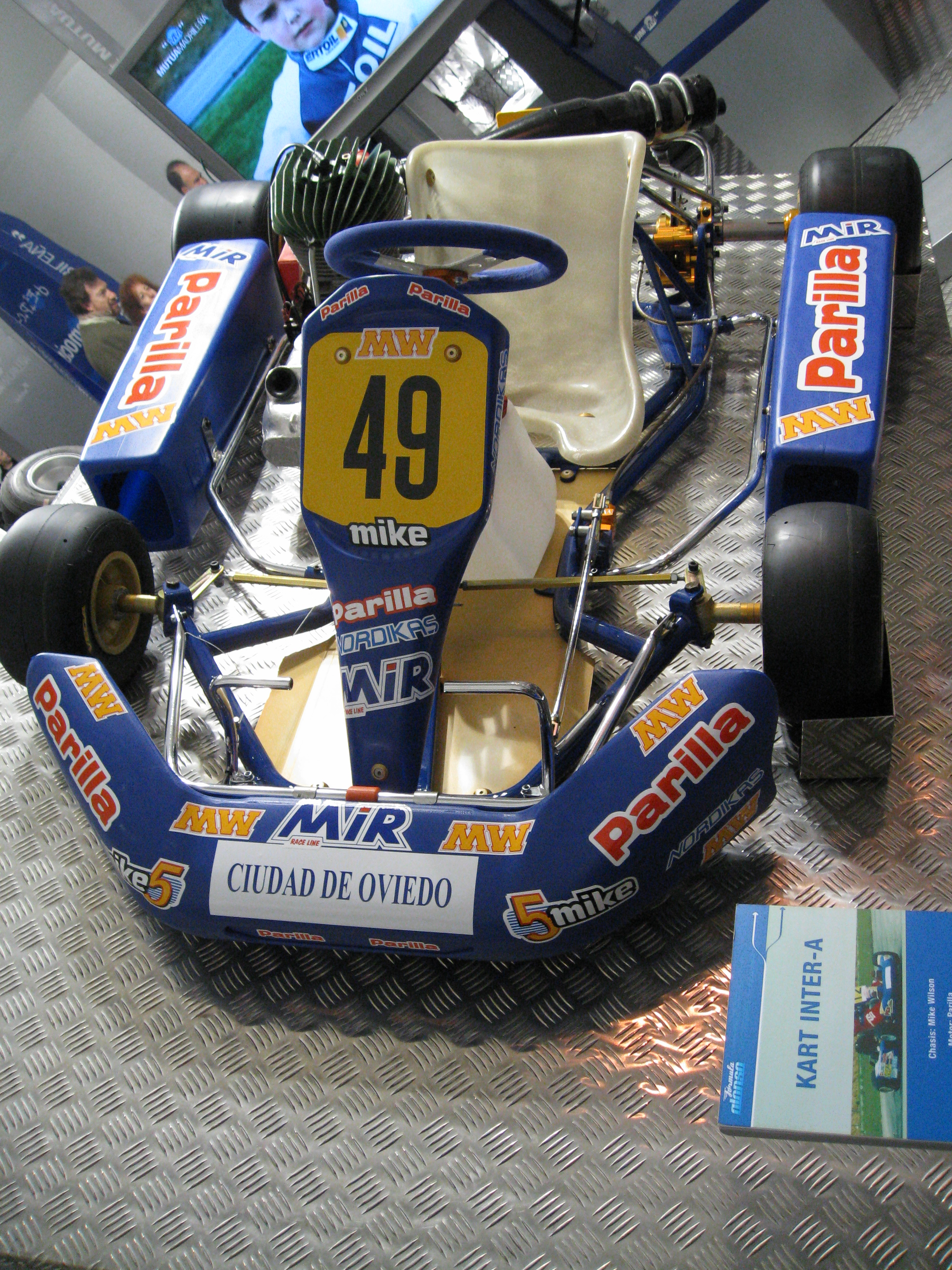 Kart de Fernando Alonso en categoría inter A